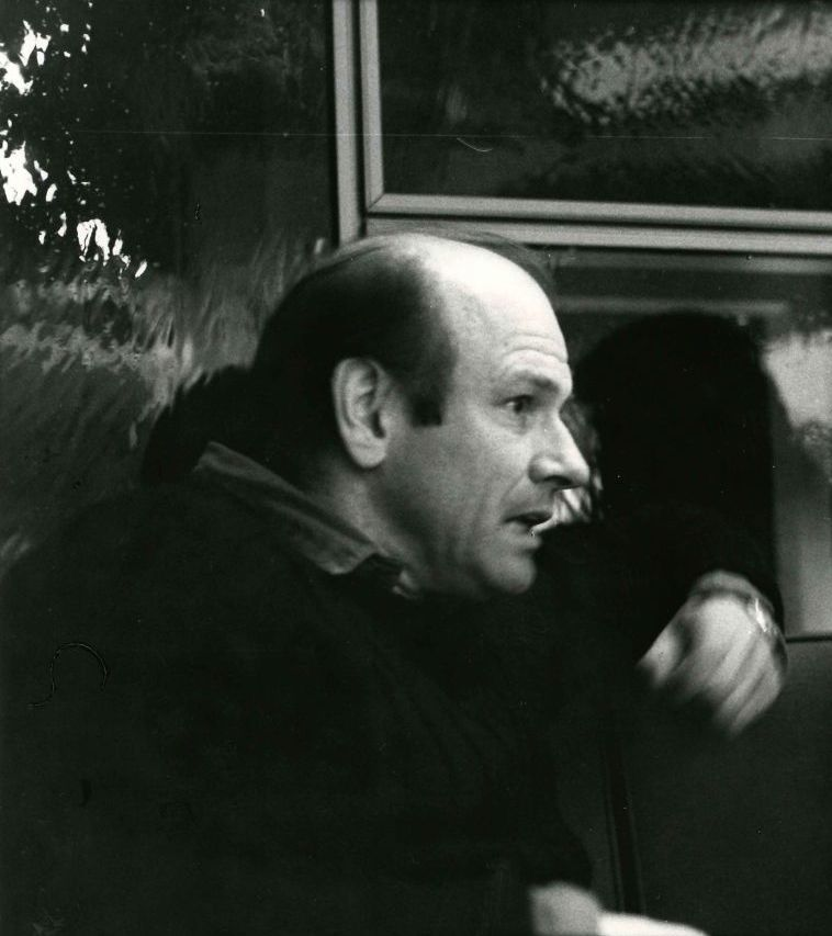 Der Schauspieler Klaus Löwitsch in einer Aufnahme des Berliner Fotografen Werner Bethsold.